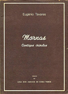 Mornas - cantigas crioulas de Eugénio Tavares. Edição da liga dos amigos de Cabo Verde. Luanda 1969. One of the first books written in Cape Verdean Creole.